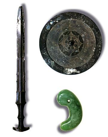 三神器